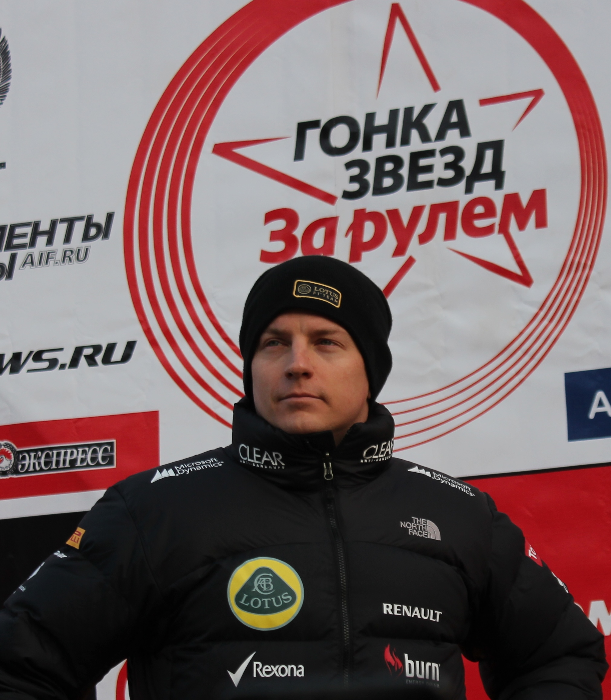 Кими Райкконен на Гонке Звёзд "За рулём" Москва 23.02.2013